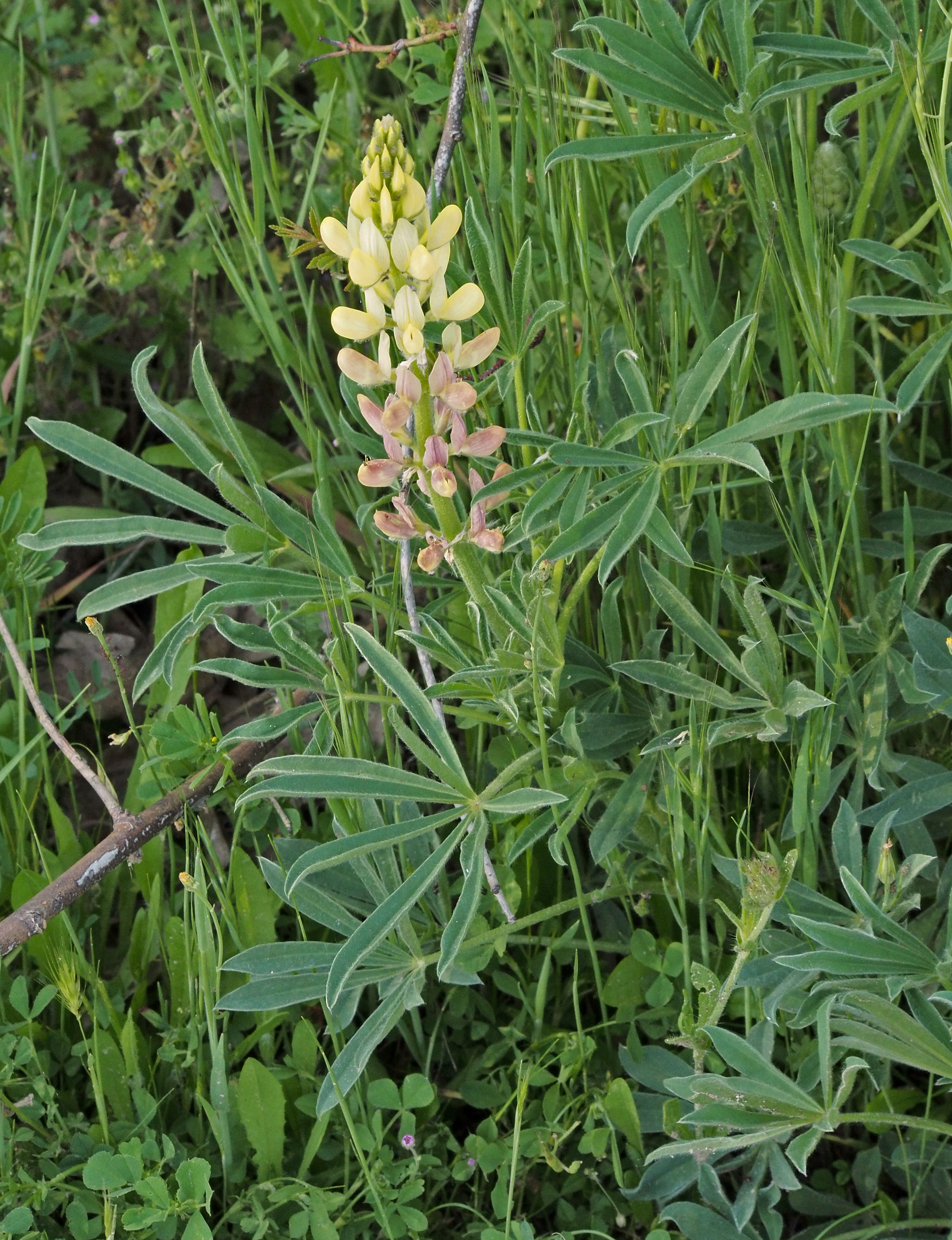 Lupinus gredensis. Losar de la Vera (Cáceres, España).